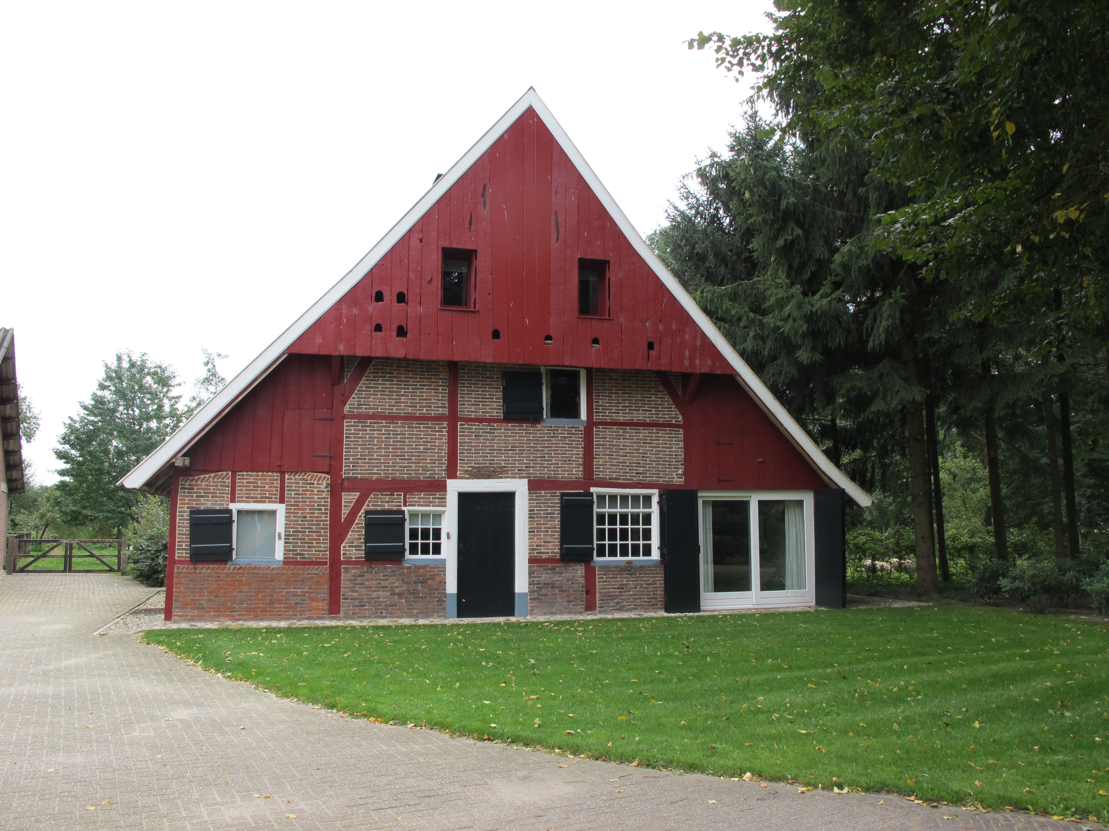 De Spieker van boerderij Ravenhorst aan de Ravenhorsterweg 88, Winterswijk